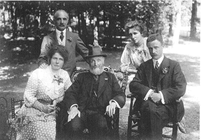 Rond 1905 bij Joseph Hermann Biegel (1837-1922), de grootvader van Paul. Hij wordt geflankeerd door de echtparen Biegel-Povel en Povel-Biegel. Rechts zijn zoon Hermann (1876-1947), de vader van Paul, met achter hem Pauls moeder, Madeleine Povel (1879-1957). Links zijn dochter Anna (1877-1948) met haar echtgenoot Hyacinth Povel (1872-1960), een broer van de moeder van Paul.